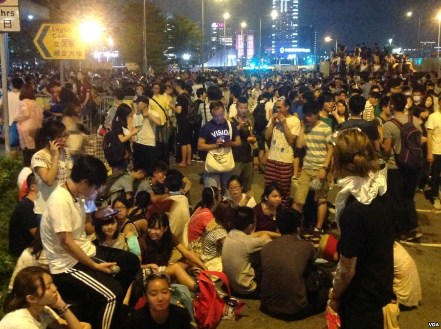 中文（台灣）: 和平佔領中環行動星期天淩晨正式啟動